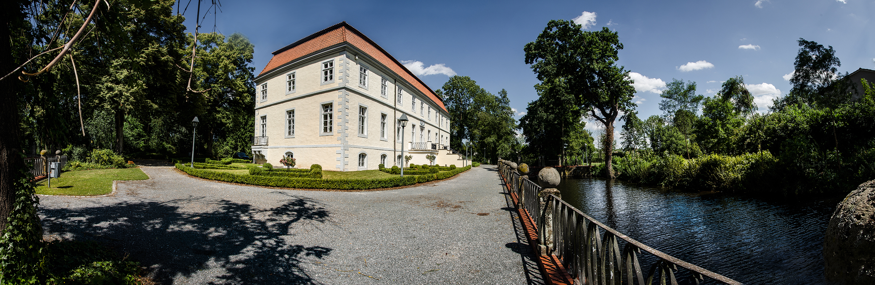 Wasserschloss Ovelgönne Panorama